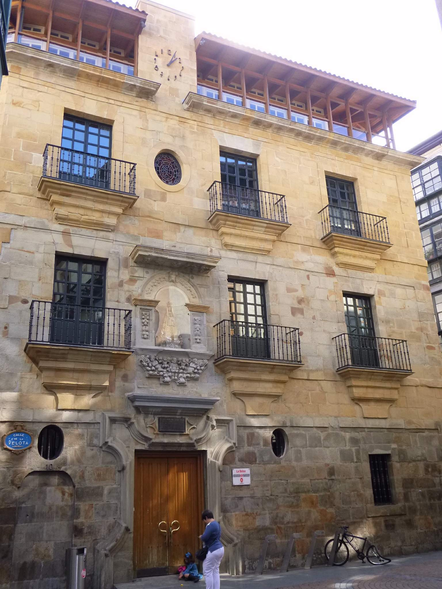 Bilbao - Palacio de Yohn (Edificio La Bolsa)